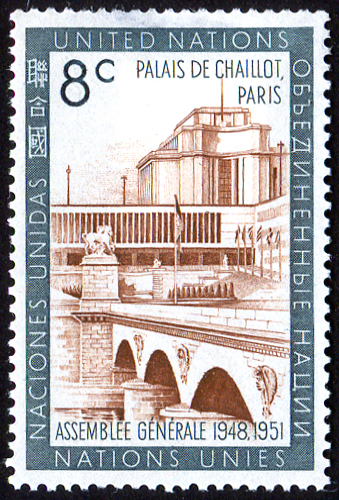 Беларуская (тарашкевіца): Парыскі будынак, дзе адбываліся Генэральныя асамблеі ААН 1948 і 1951 рокаў